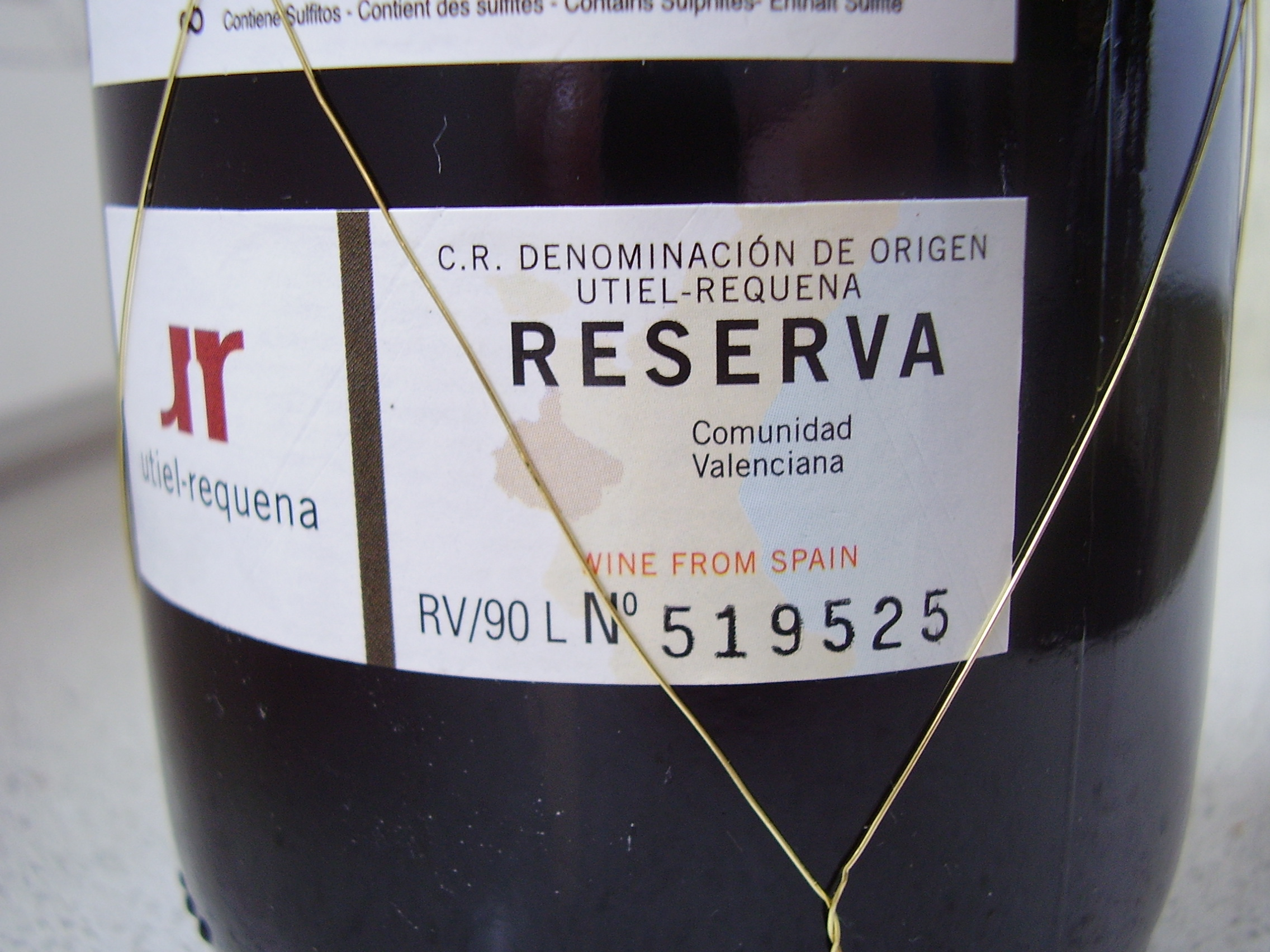 Reserva